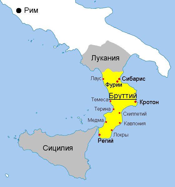 Бруттий (историческая область) и крупнейшие города